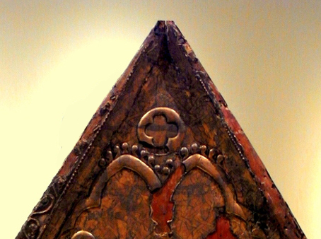 Autor anónimo. Detalle de la urna relicario de San Cándido procedente del monasterio de Sant Cugat del Valles (Barcelona) Datada 1292 Se conserva en el Museo Nacional de Arte de Cataluña